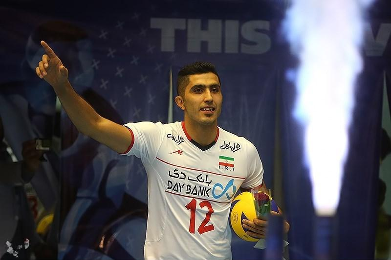 لیگ جهانی والیبال-دیدار ایران و صربستان